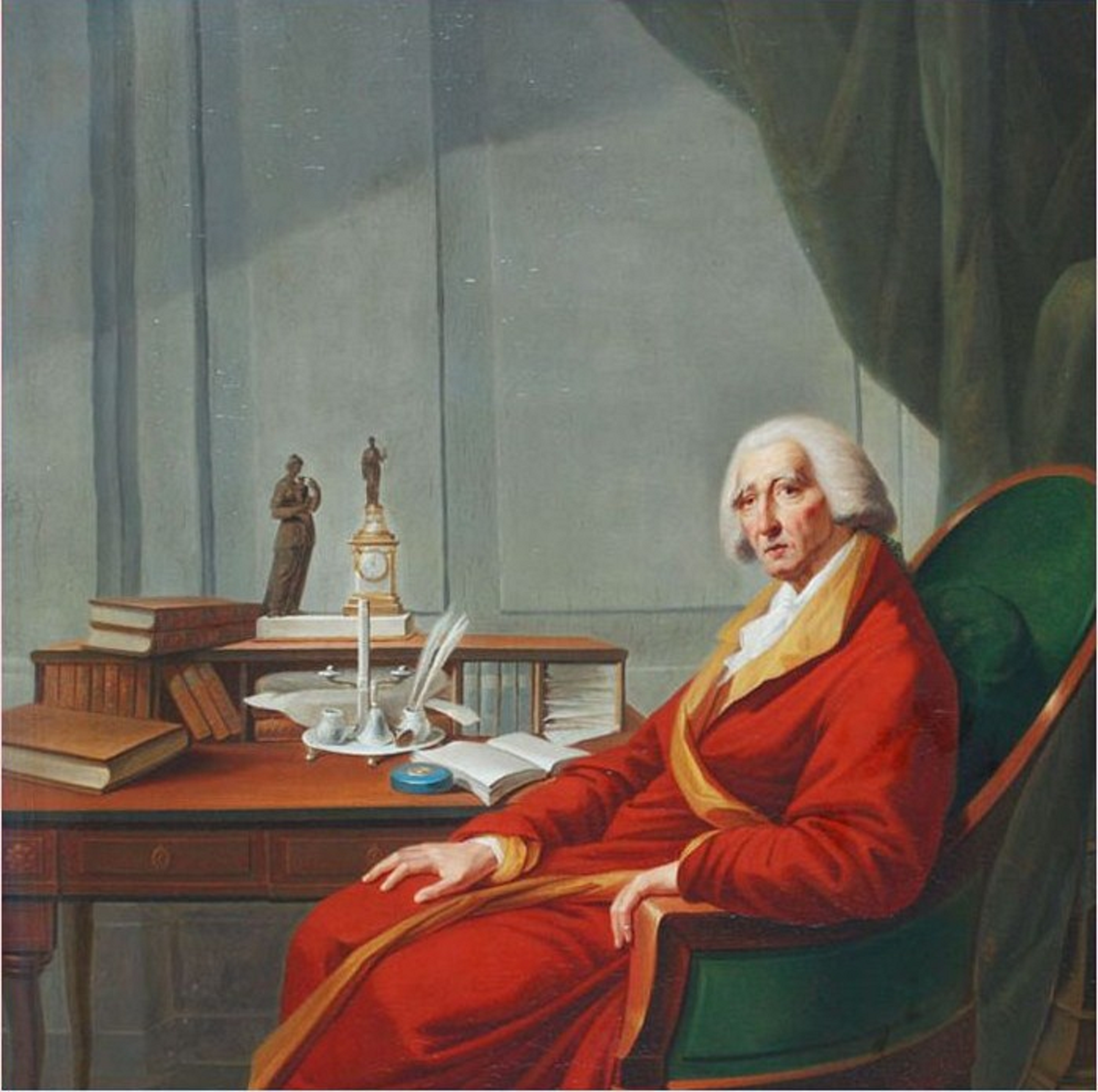 Altersporträt des Grafen Ivan A. Ostermann (1725—1811), russischer Reichskanzler a. D., in seinem Arbeitszimmer.